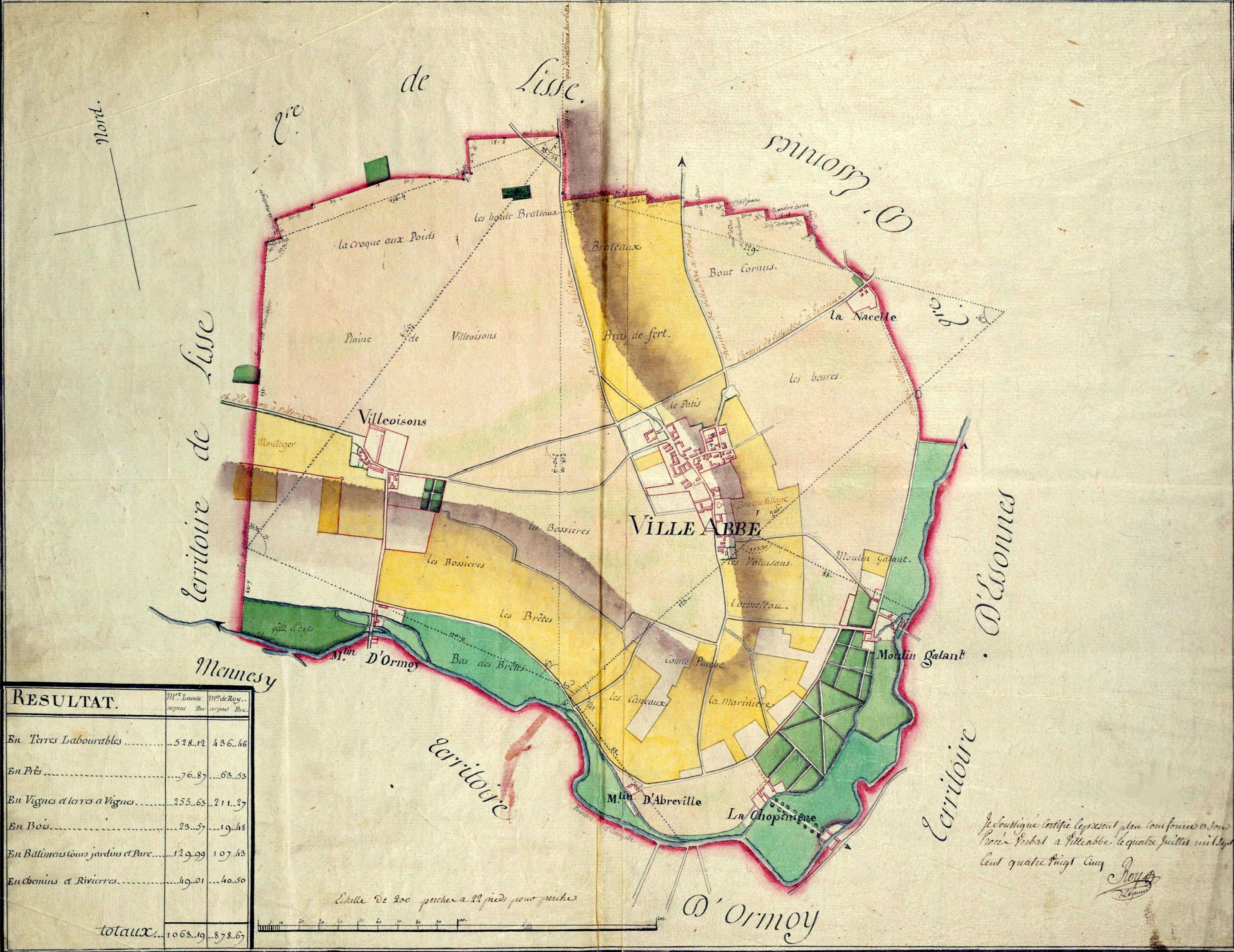 Plan d’intendance de Villabé réalisé en 1785